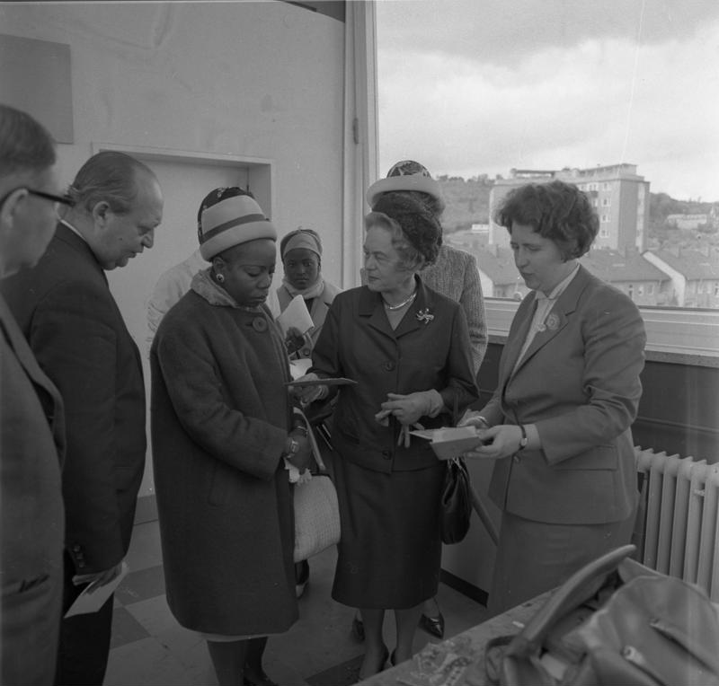 Frau [Wilhelmine] Lübke und Frau Loffo, Staatssekretärin aus Guinea, besuchen die Elly-Heuß-Knapp-Schule in Bonn